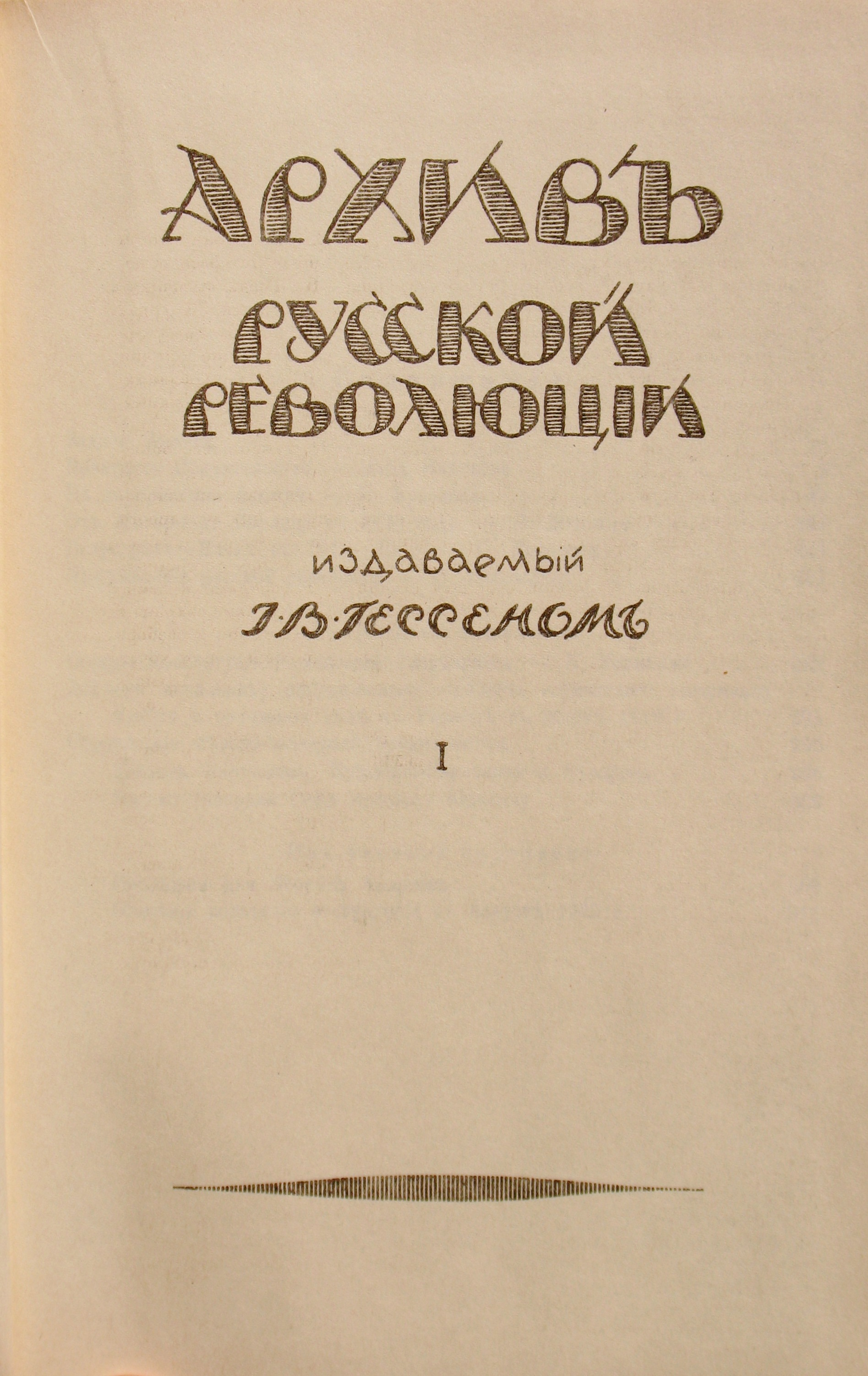 Архив русской революции. Издание Гессена. Берлин, том 1, 1921 год. Титульный лист.